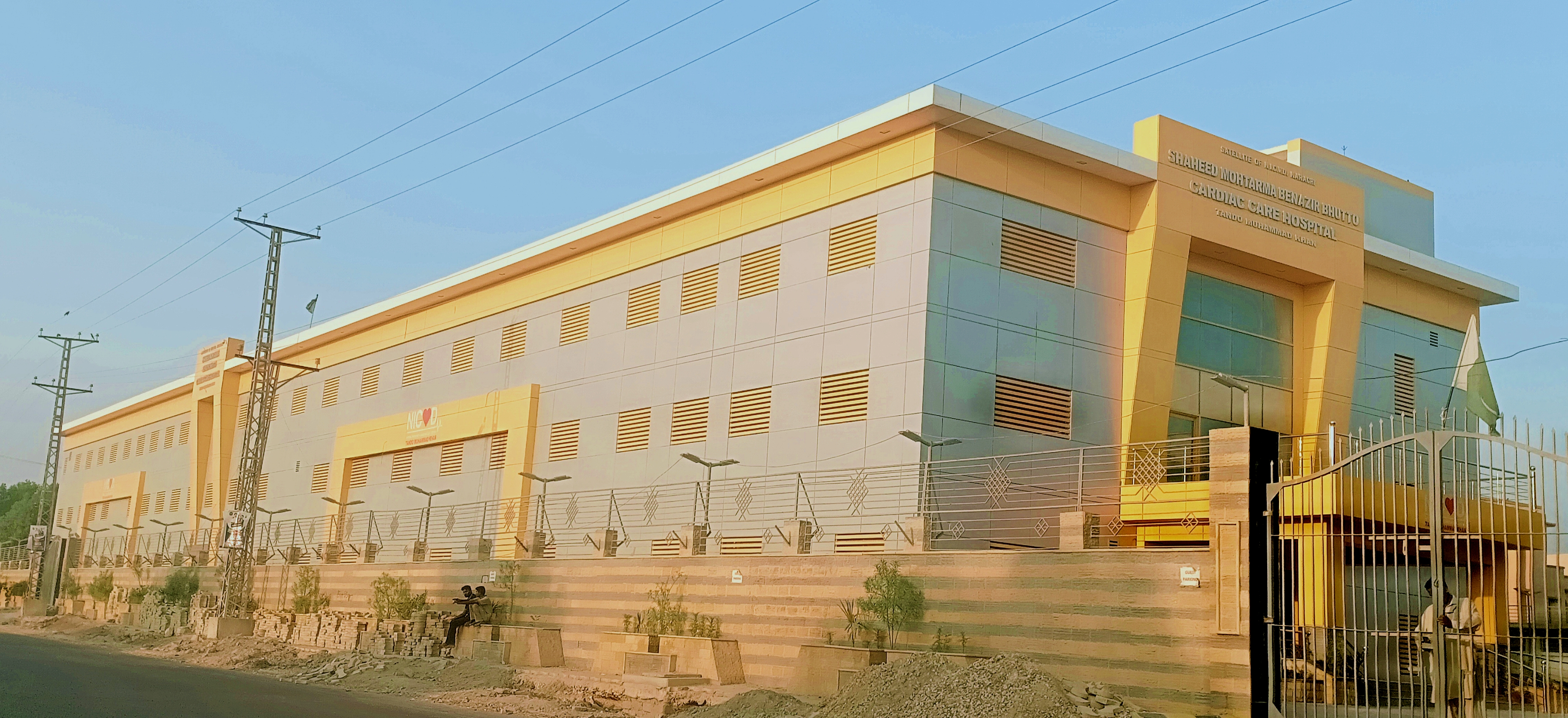 سنڌي: اين آء سي وي ڊي ھاسپيٽل ، ٽنڊو محمد خان ، دل جي بيمارين جو مفت علاج ڪندڙ سرڪاري ادارو